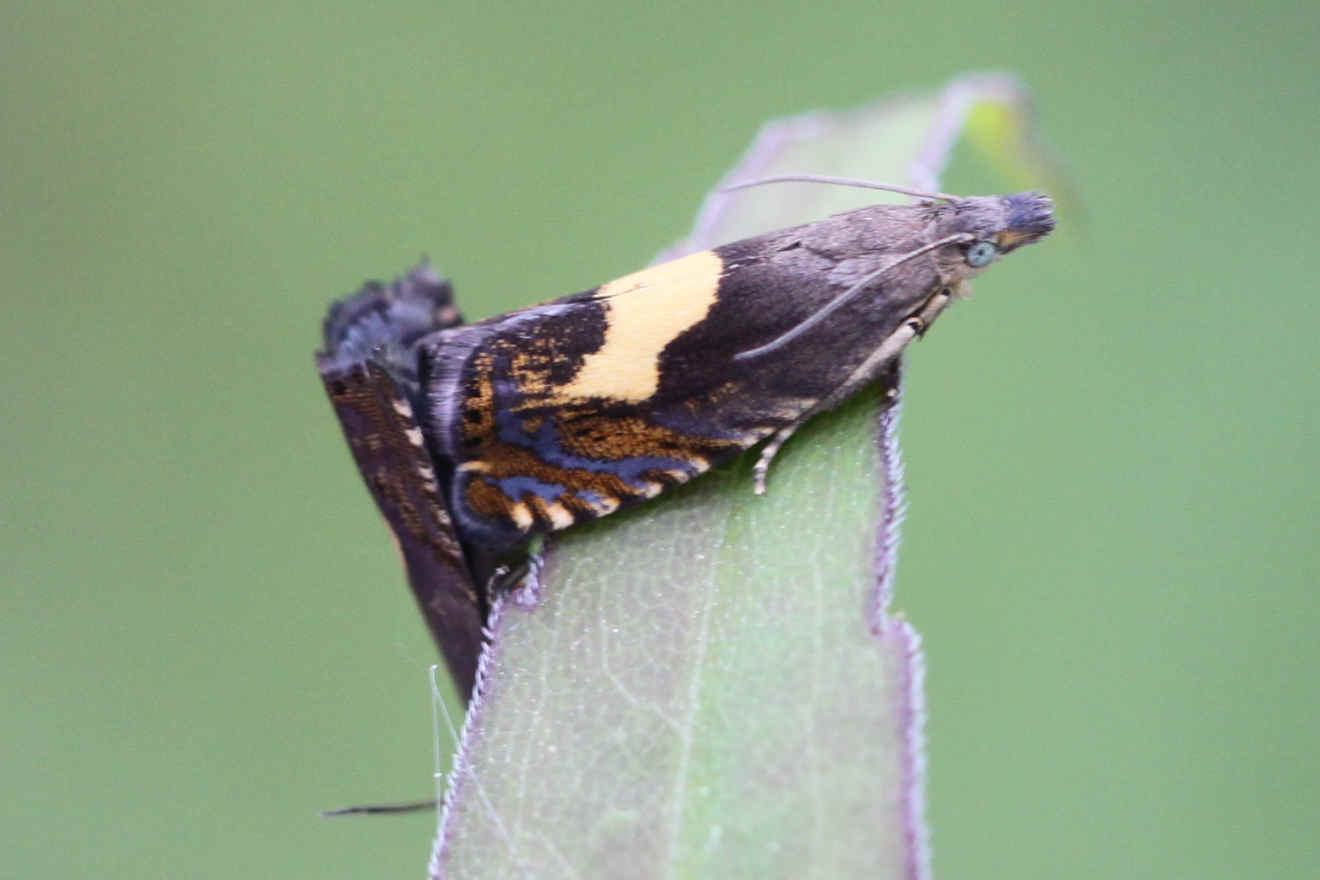 Dichrorampha sequana, am 23.5.2017 in der Schwetzinger Hardt